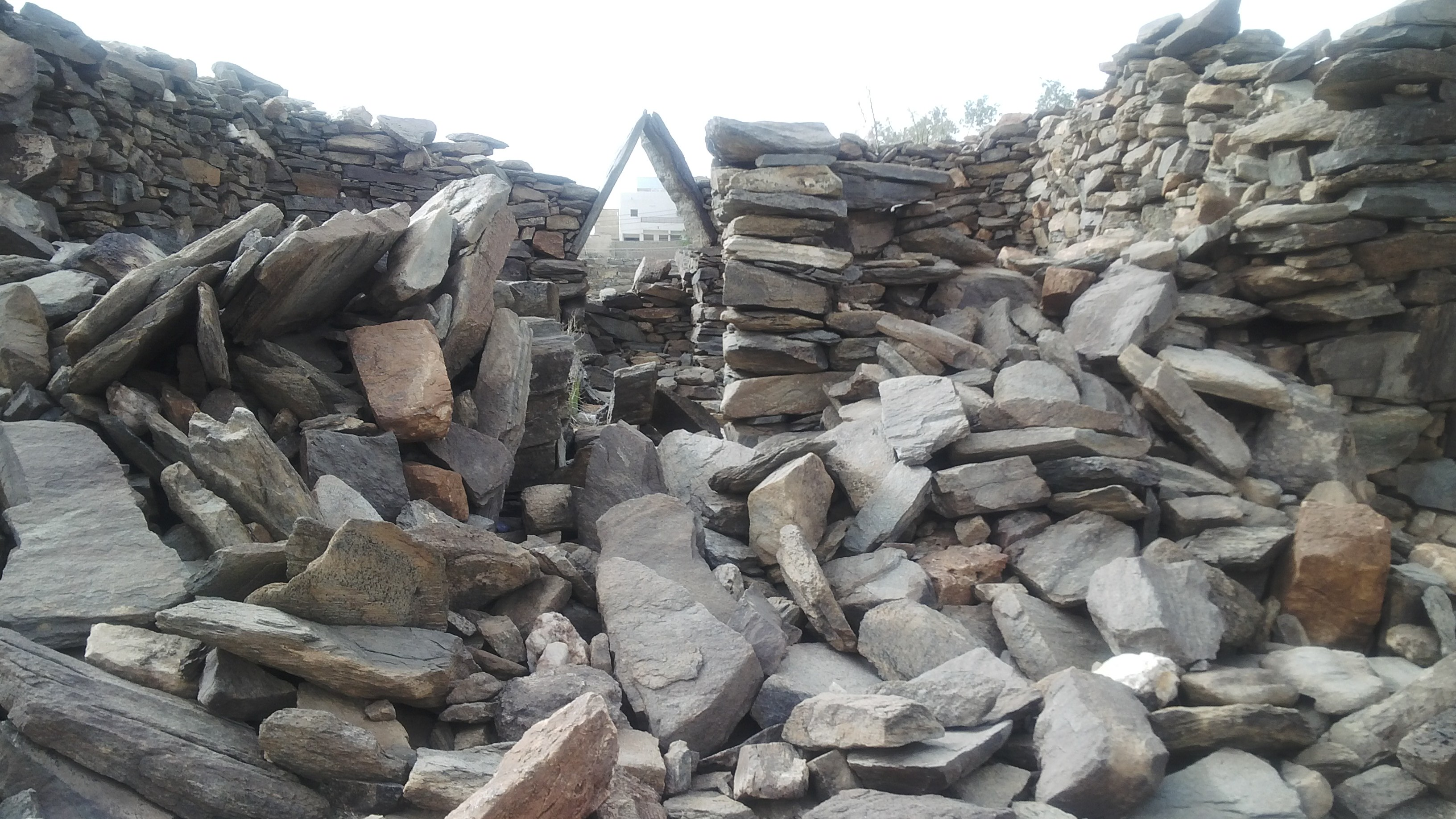 مسجد قديم بارق